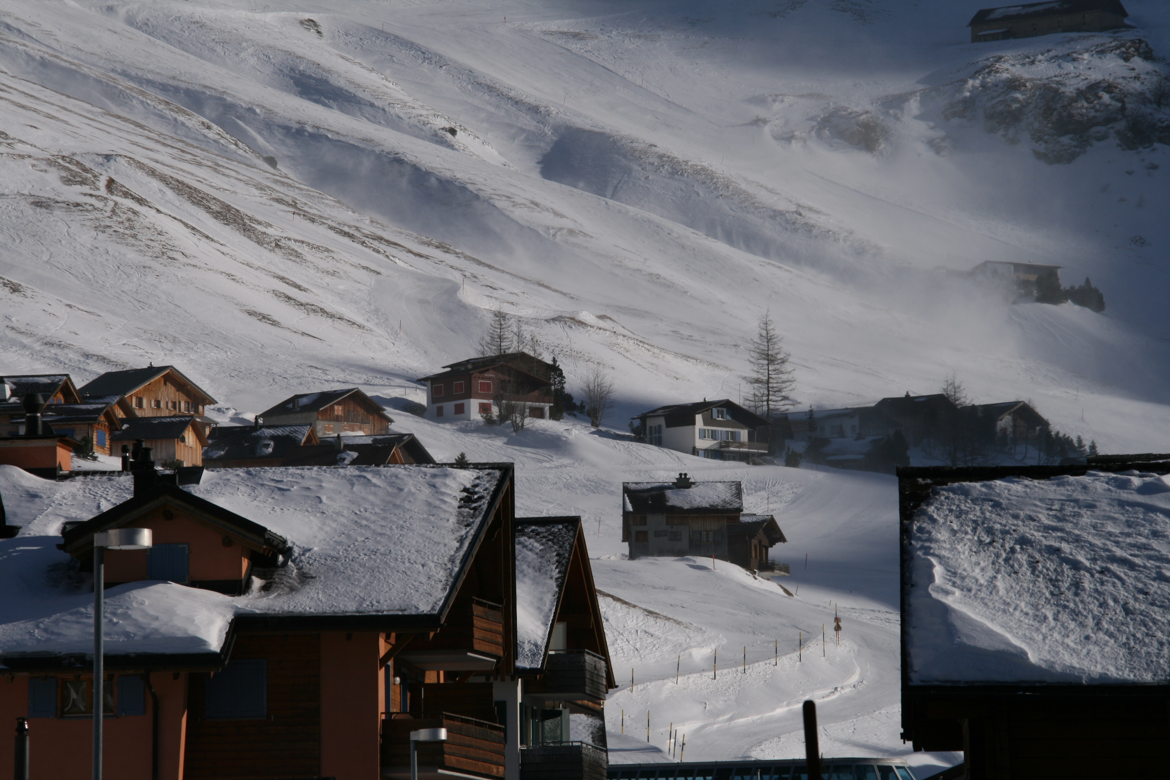 Schneetreiben im Talkessel von Malbun.